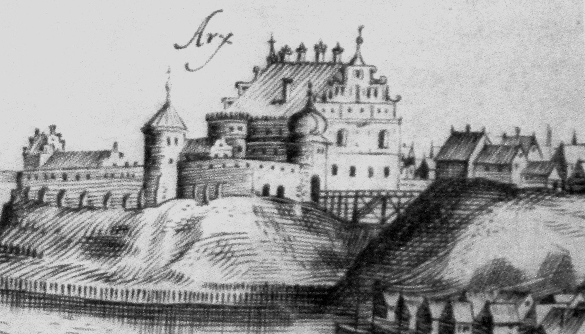 Беларуская (тарашкевіца): Стары замак у Гродне на малюнку Т. Макоўскага